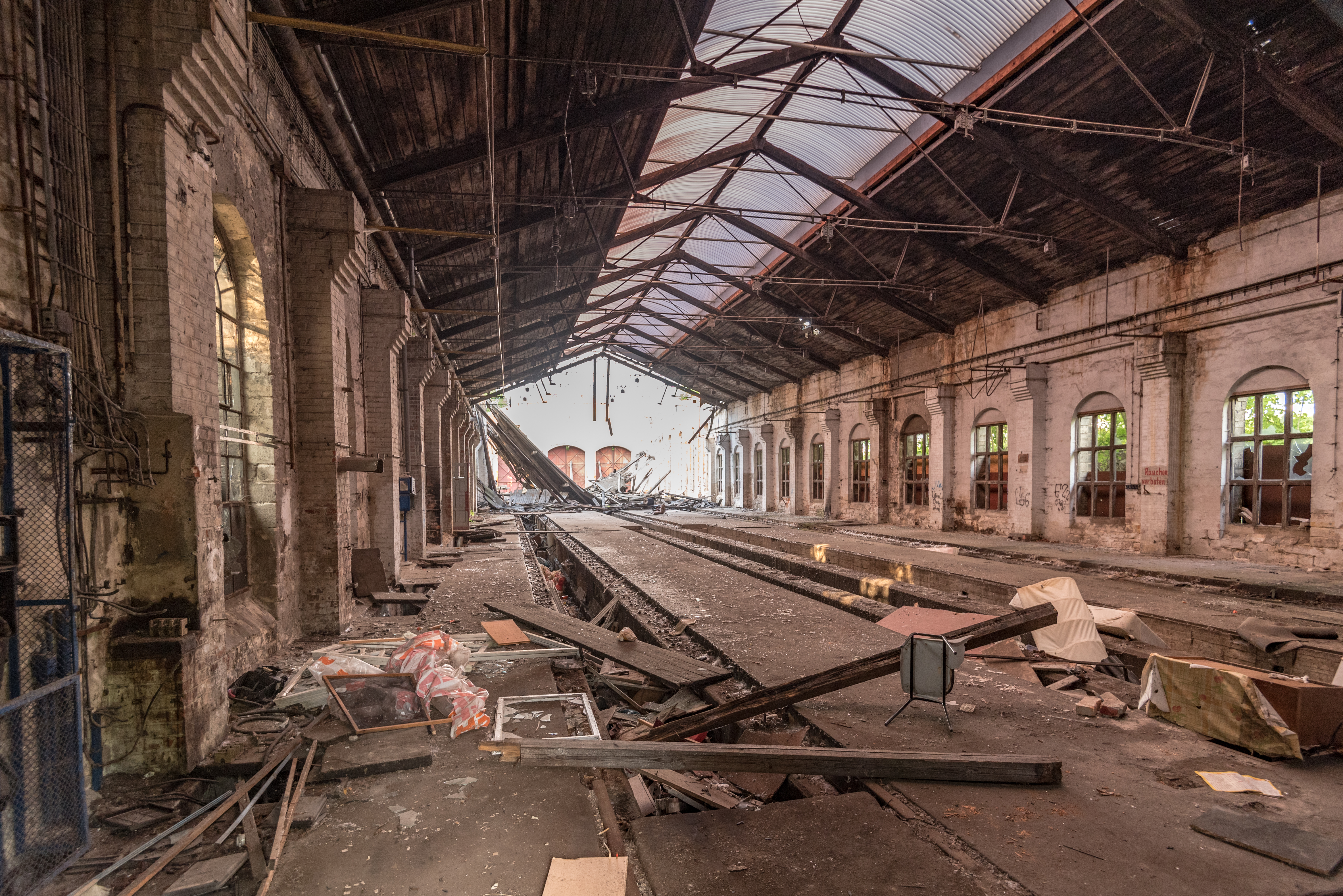 Weißenfels, Zum Bahnhof, Lokhalle